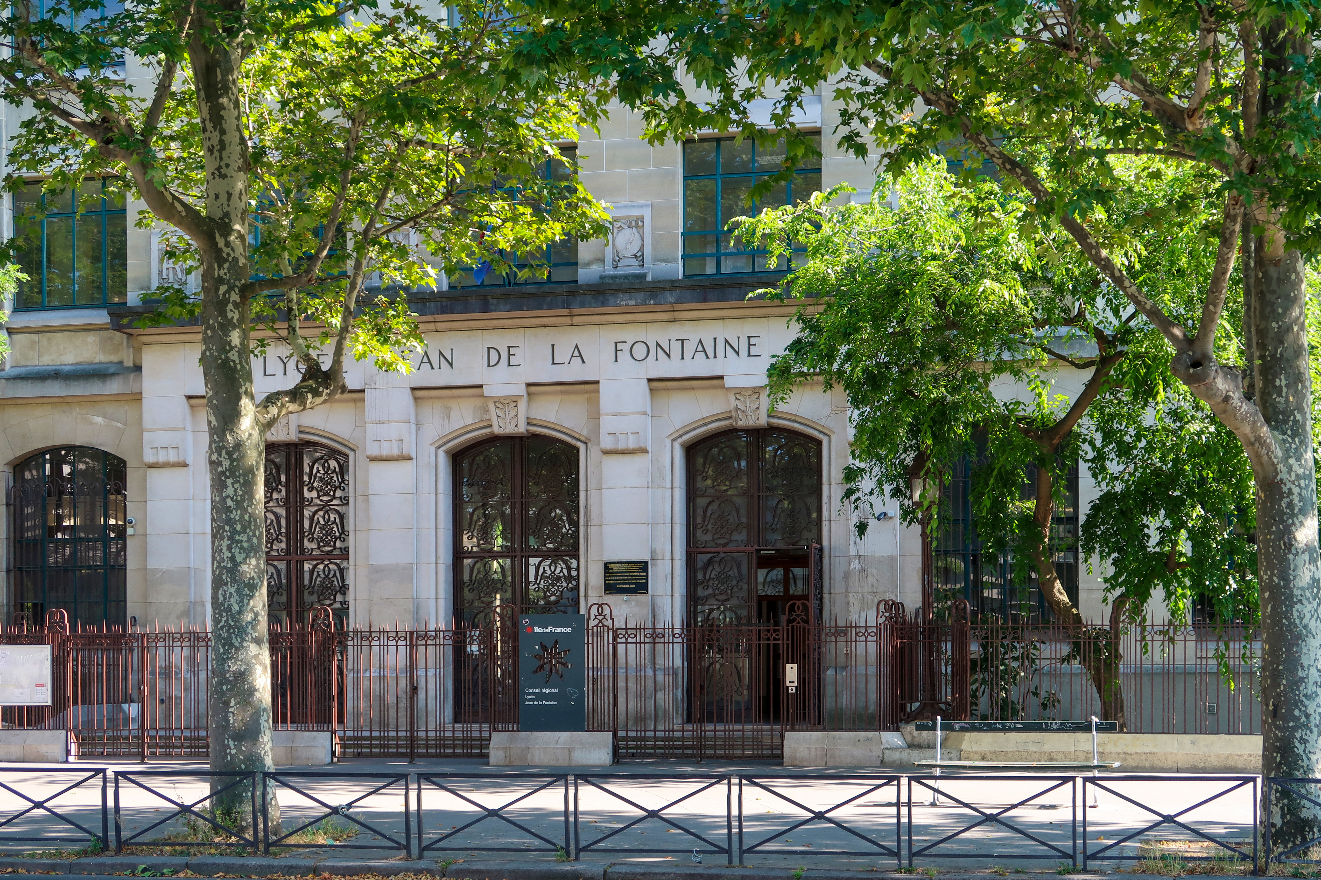 Lycée Jean-de-La-Fontaine (Paris, 16e).